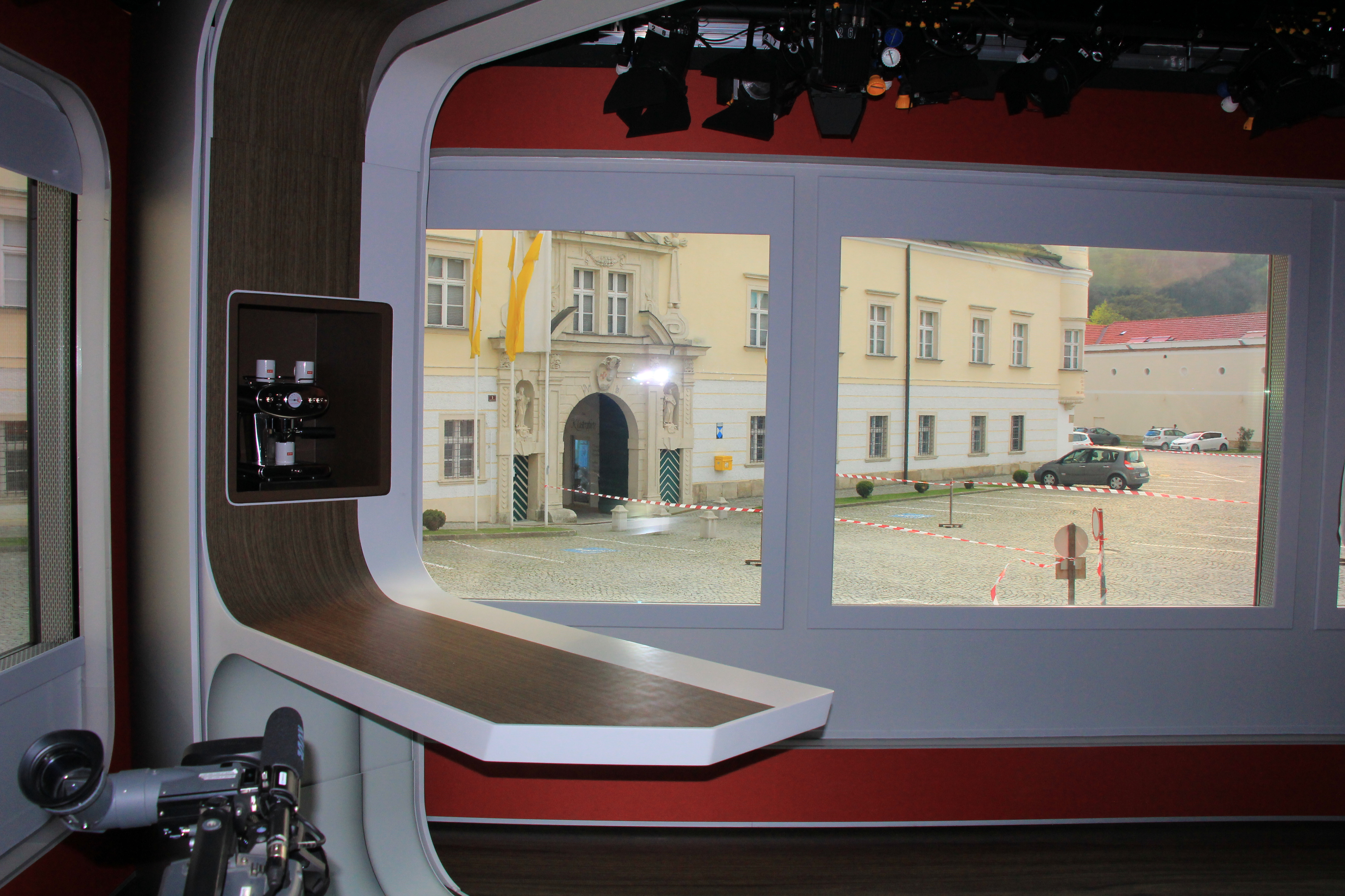 Übertragung der ORF-Sendung Guten Morgen Österreich vom Stift Heiligenkreuz in Niederösterreich